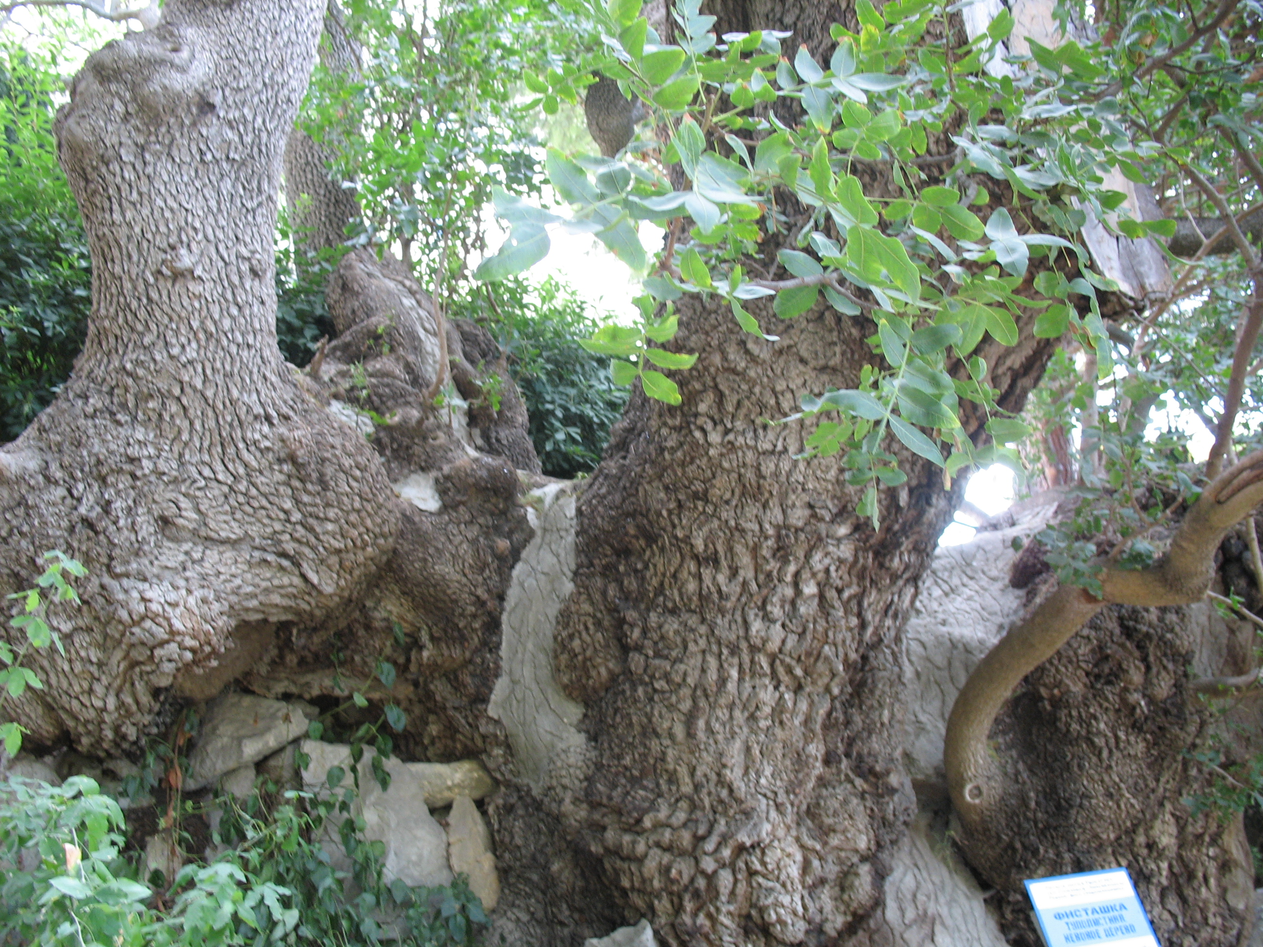 Фисташка НБС: в 20 метрах ниже научного корпуса в Верхнем парке,пгт Никита,Ялта, This object is located on the Crimean Peninsula and recognized as a protected area by both Russia and Ukraine under the ID: 8210186 / 01-119-5046, respectively. The legal status of the Crimean region is currently disputed.